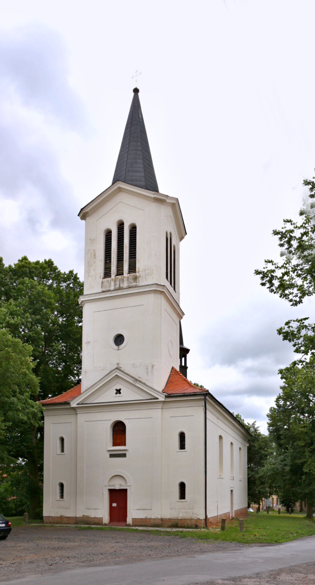 Mutějovice